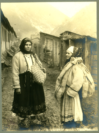 Adler - Costume populare feminine din Merişor